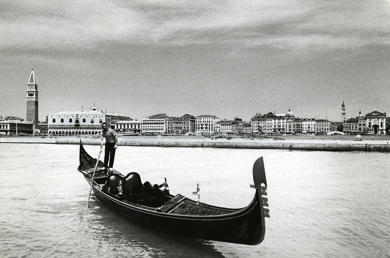 Venezia. Gondole in mare, con vista verso Palazzo Ducale e Campanile della Basilica di San Marco. Particolari. Forcola, cavallucciomarino in ottone, ferro di prua. Gondoliere. Servizio fotografico : Venezia, 1974 / Paolo Monti. - Stampe: 7 : Positivo b/n, gelatina bromuro d'argento/ carta, 24x30. - ((Al verso delle stampe manoscritti i numeri dei negativi corrispondenti (formato 35 mm) con indicazione del fotogramma: 2605/20, 2606/12 (43), 1606/24, 2607/16, 2607/18, 2607/20, 2607/30, con tra parentesi la numerazione interna alla serie di stampe "Venezia e la sua gondola", manoscritta a penna e cerchiata; iscrizione documentaria manoscritta a matita: "1972"; timbro a inchiostro con copyright: "© Copyright/ Credit to/ Paolo Monti/ Corso Sempione [...]/ Milano". - Sul coperchio della scatola iscrizione didascalica manoscritta a pennarello nero: "Venezia/ Gondola". - Nella scatola conservati 3 pagine di fogli manoscritti a penna intitolati "Venezia dei fotografi/ Paolo Monti/ Fotografie da 1 a 51", con annotazioni tecniche, e firmati "Berengo Gardin". - Occasione: Documentazione per la pubblicazione: Chiesa Butazzi Grazietta, "Venezia e la sua gondola", Milano, Gorlich, 1974. - Monografia di Chiesa Butazzi, Grazietta: Venezia e la sua gondola, Milano, Görlich (1974). - Fonte